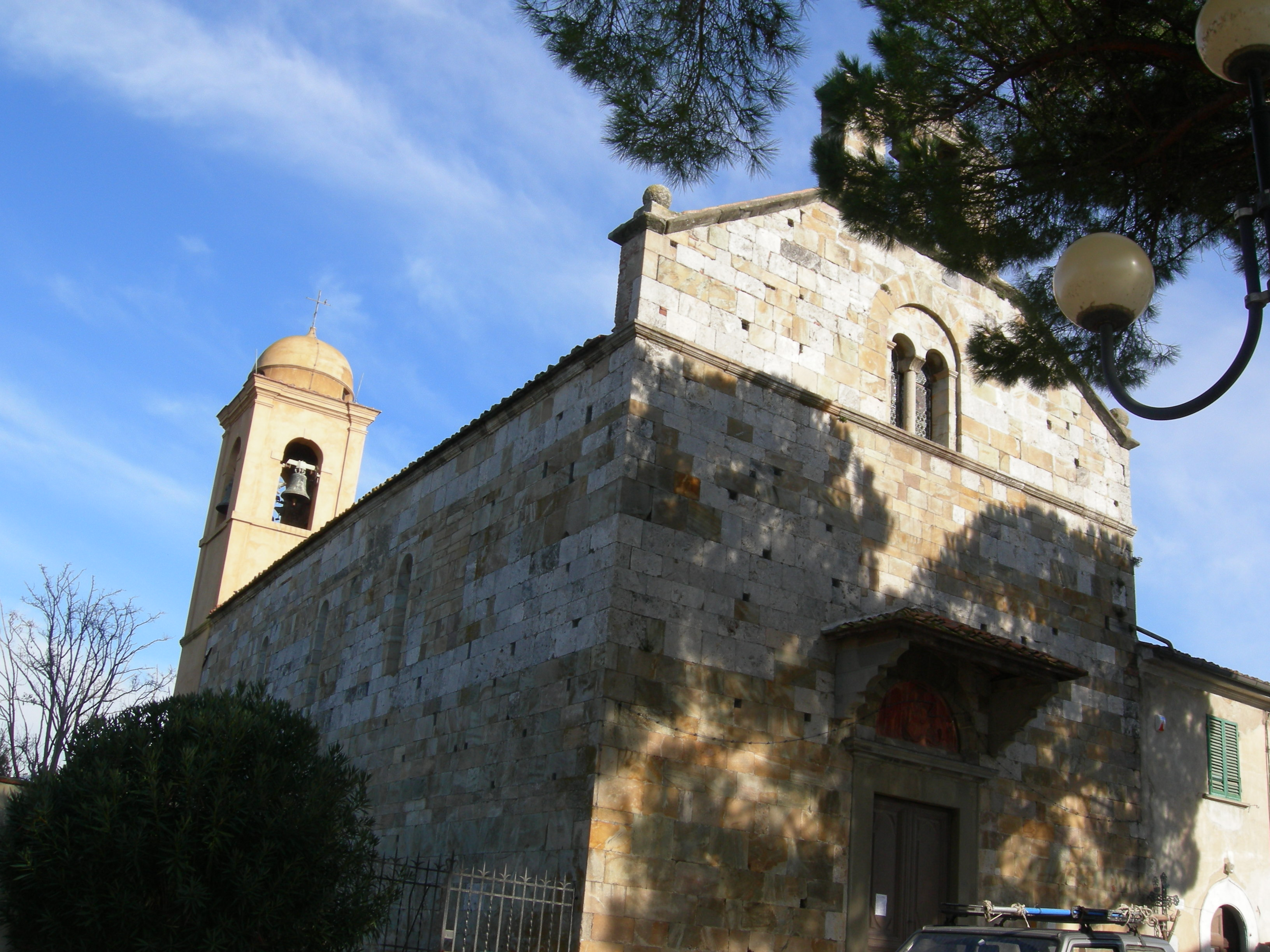 Foto scattata da me